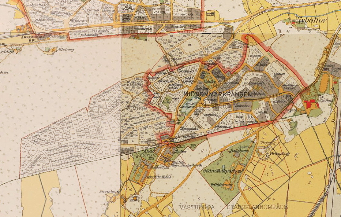 Del av 1934 års karta över Stockholm med omgivningar visande Midsommarkransen